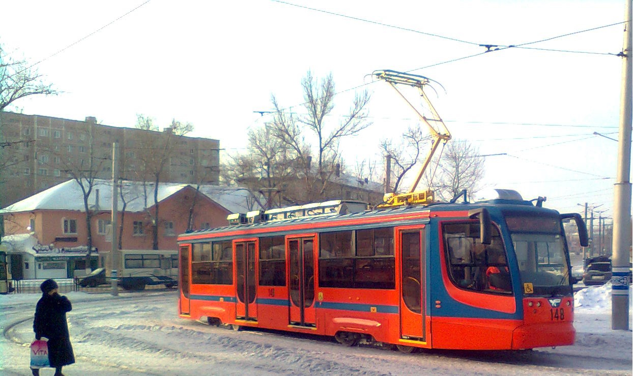 Павлодар